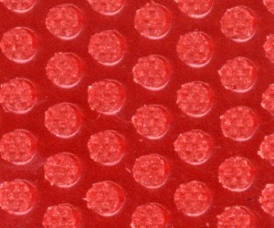 Tischtennis-Belag - Noppenbild mit Textilstruktur